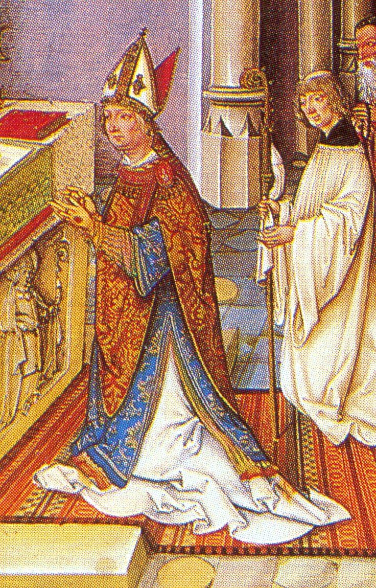 Wilhelm_von_Reichenau_Bischof_von_Eichstätt_im_Pontifikla_Gundekarianum